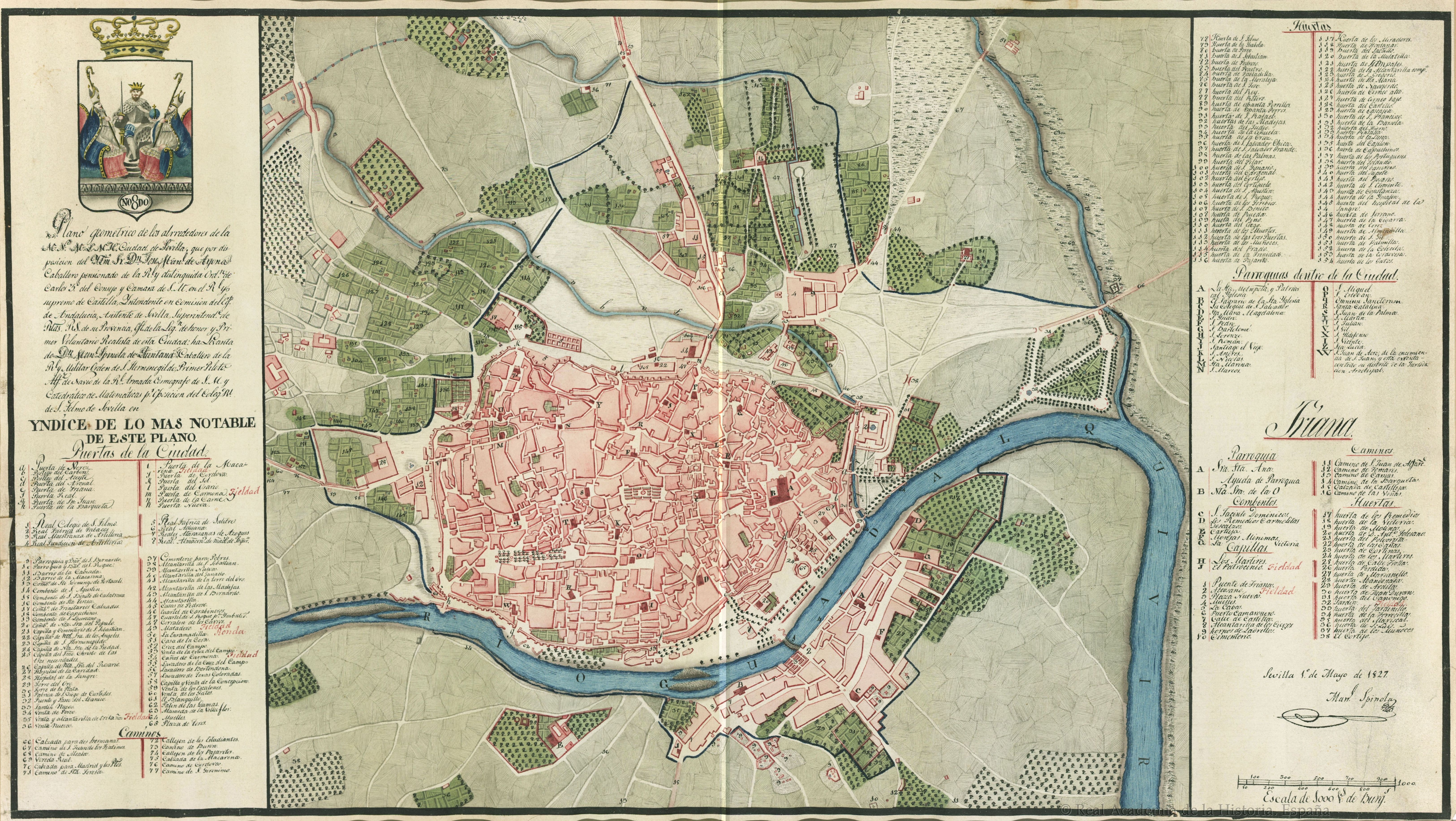 Plano de la Muy Noble, Muy Honorable, Muy Leal ciudad de Sevilla.